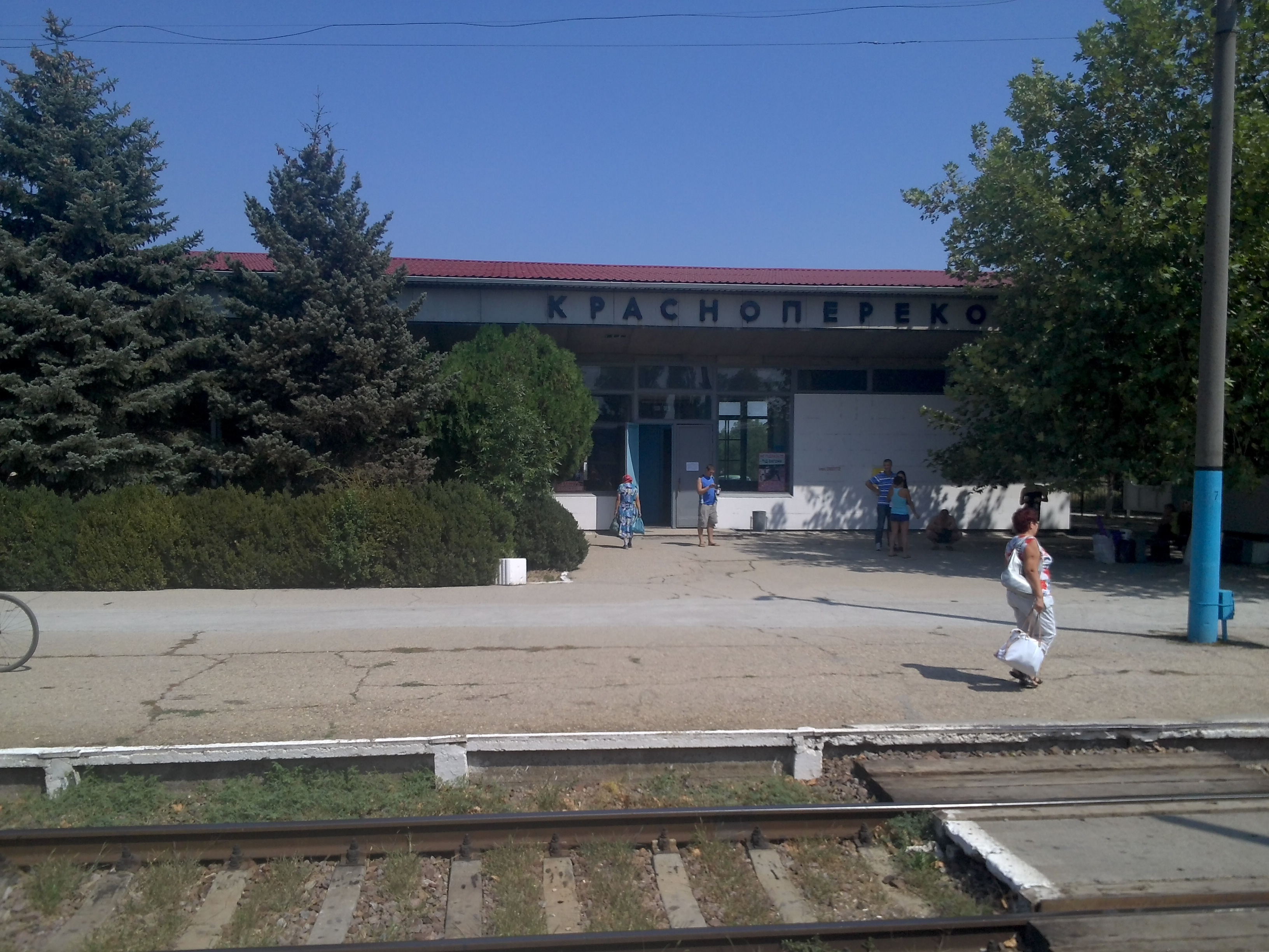 Ст. Красноперекопськ